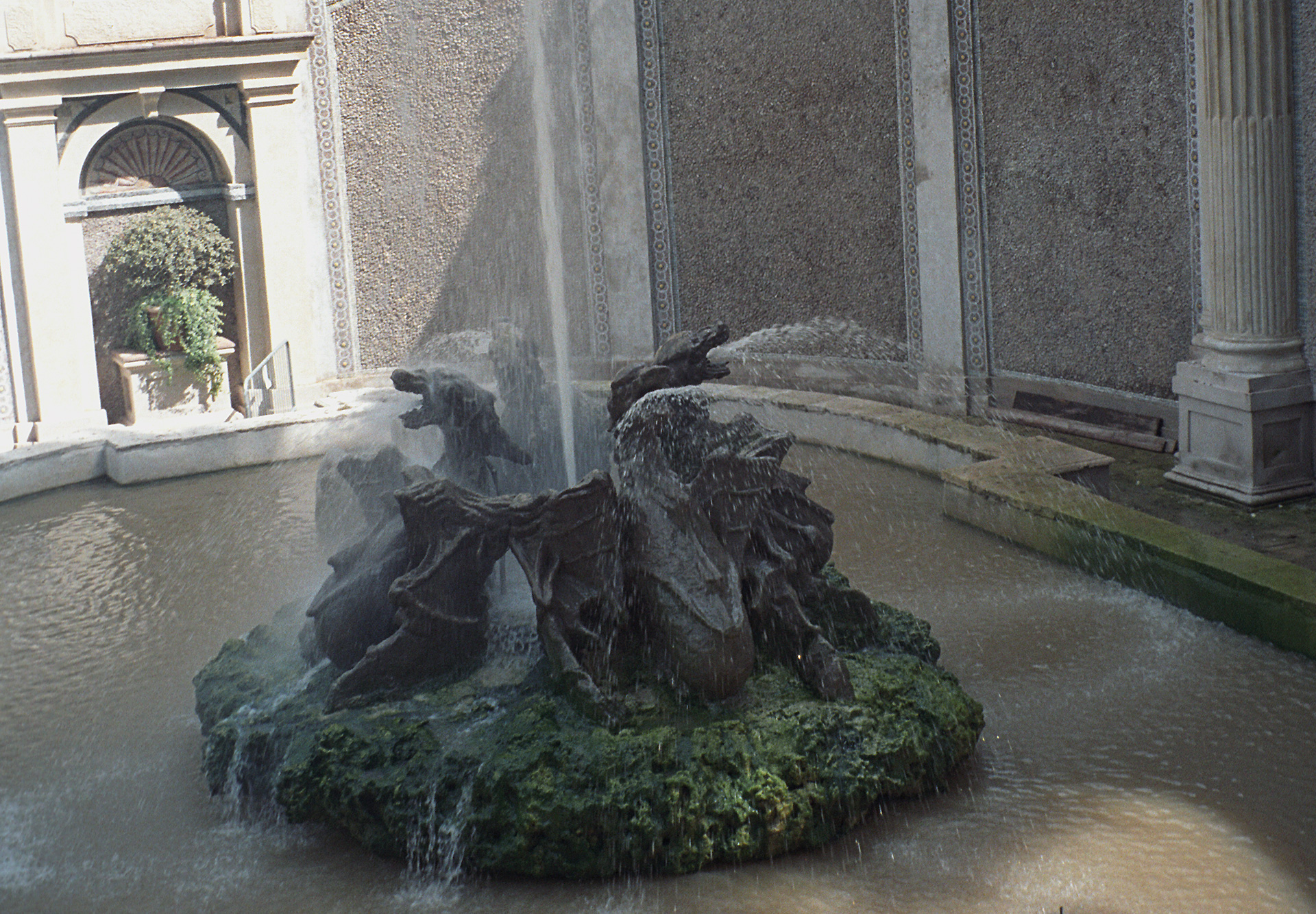 Villa d'Este, Tivoli